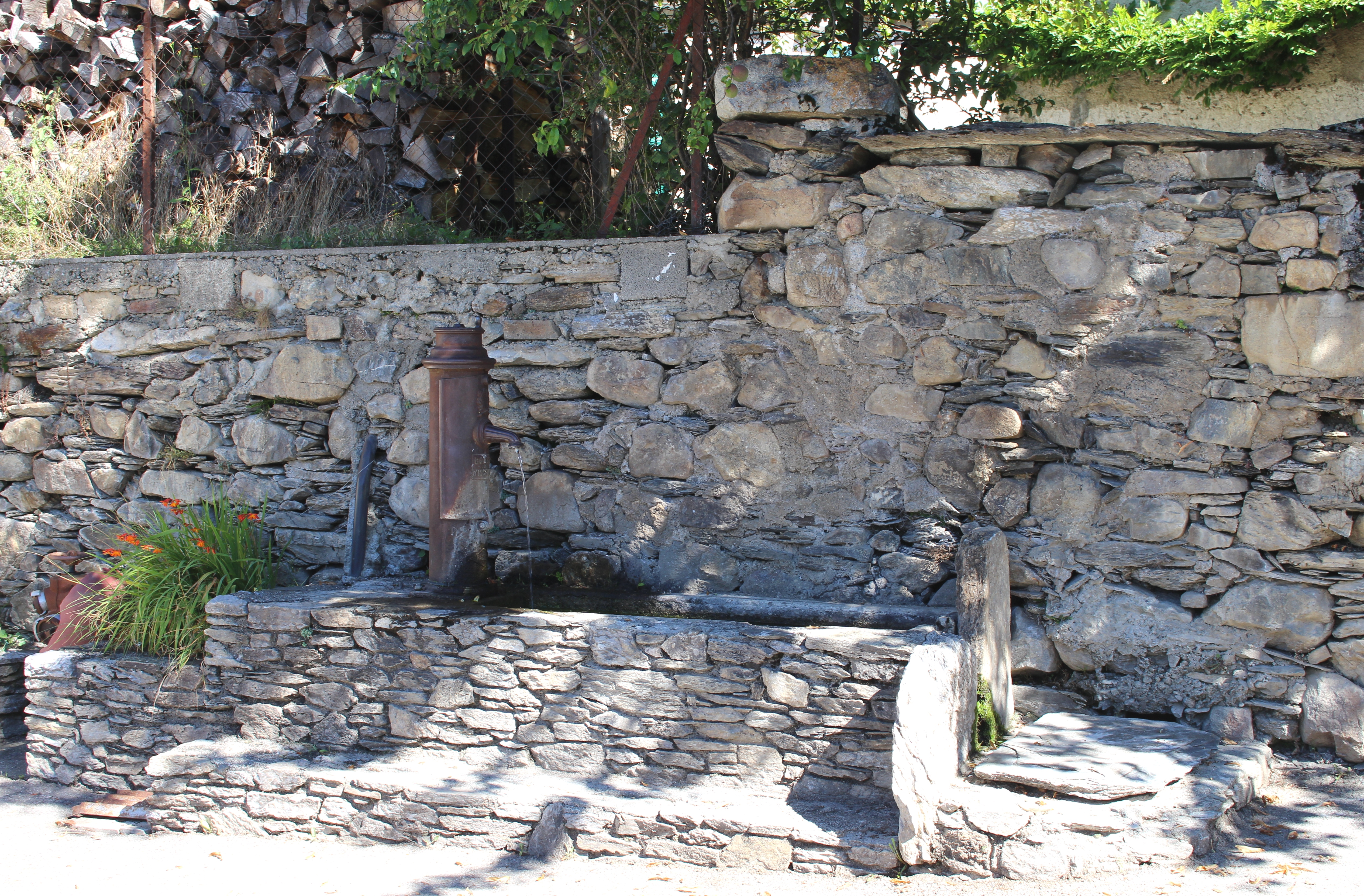 Fontaine de Mont (Hautes-Pyrénées)